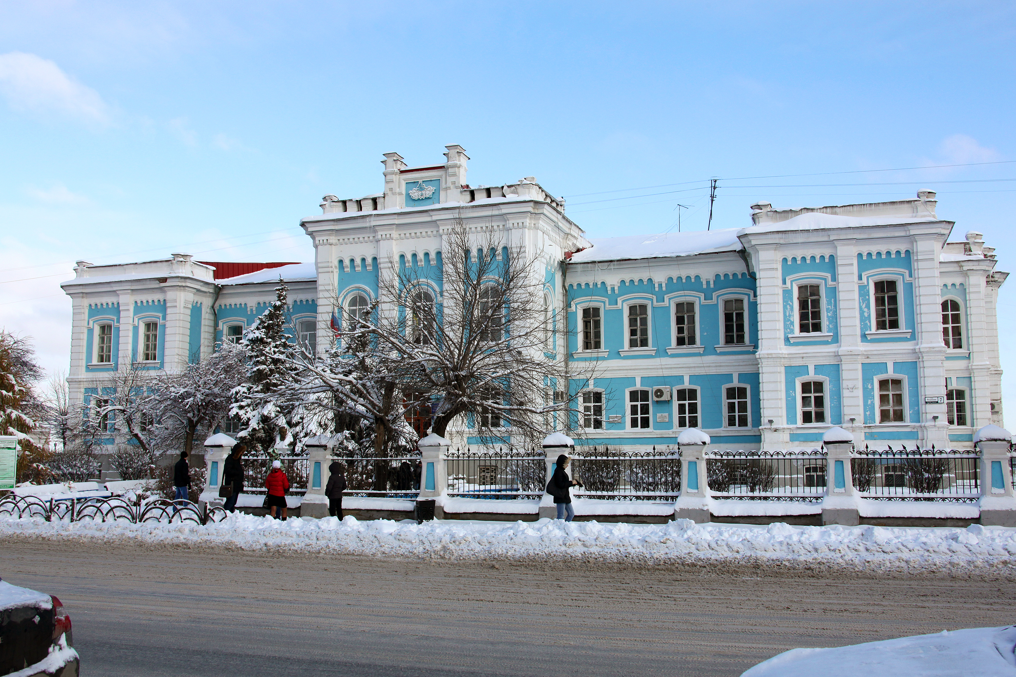 Tjumena Agrikultura Universitato. Tjumeno, Respubliko.